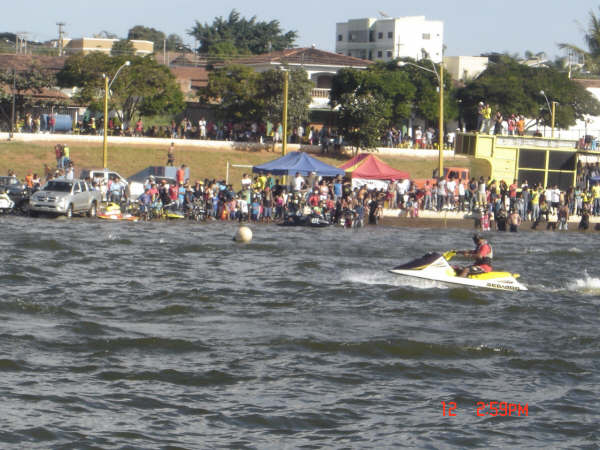 Represa do Haley, em Catalão, Goiás